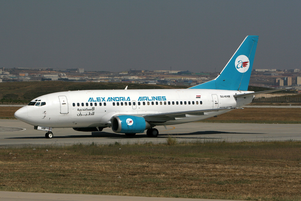 SU-KHM B737-500 Alexandria Airlines